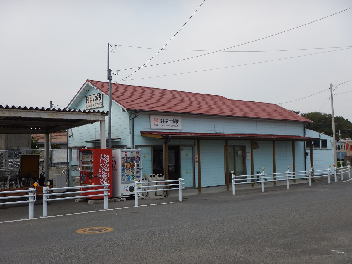 阿字ヶ浦駅舎